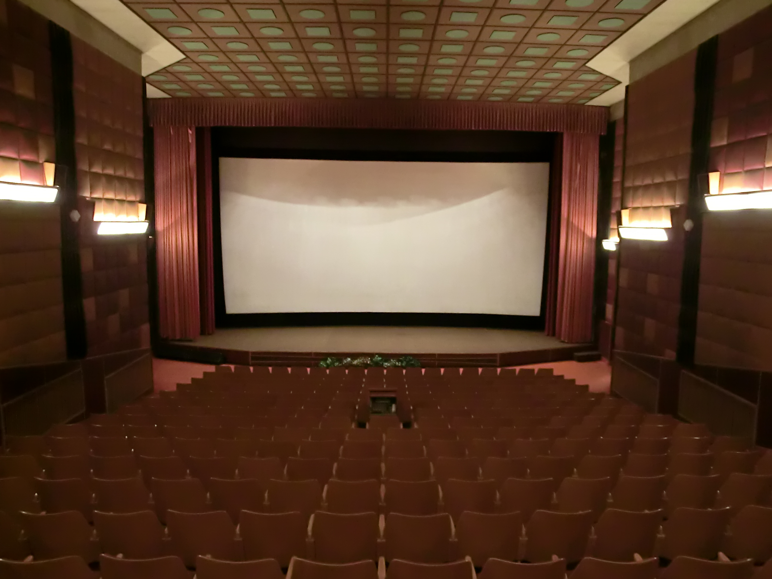 Kino 70 Jilemnice - plátno při projekci 70 mm filmu nebo digitální projekci